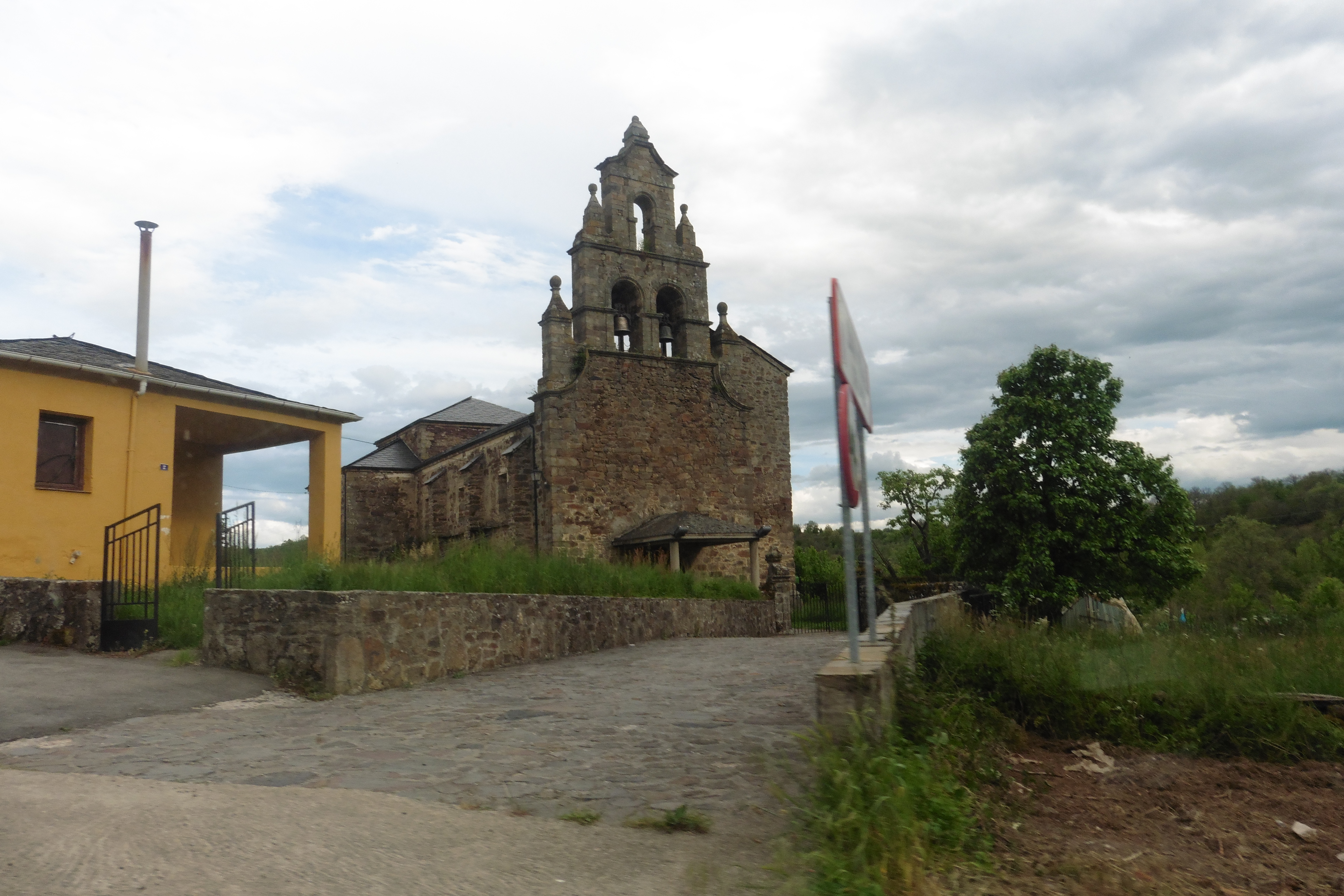 Iglesia de Santa Catalina y el Cristo, con las casas de los maestros a la izquierda, todo ello visto desde la Carretera de Langre.